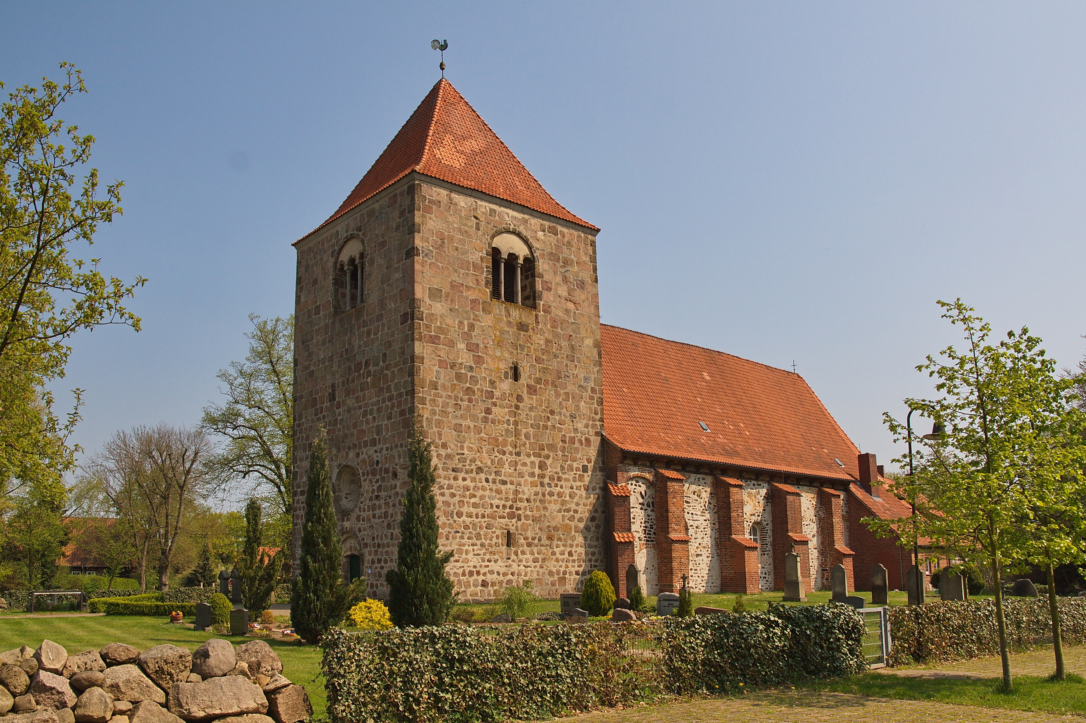 Kirche zum Heiligen Kreuz in Kirchwahlingen (Böhme), Niedersachsen, Deutschland